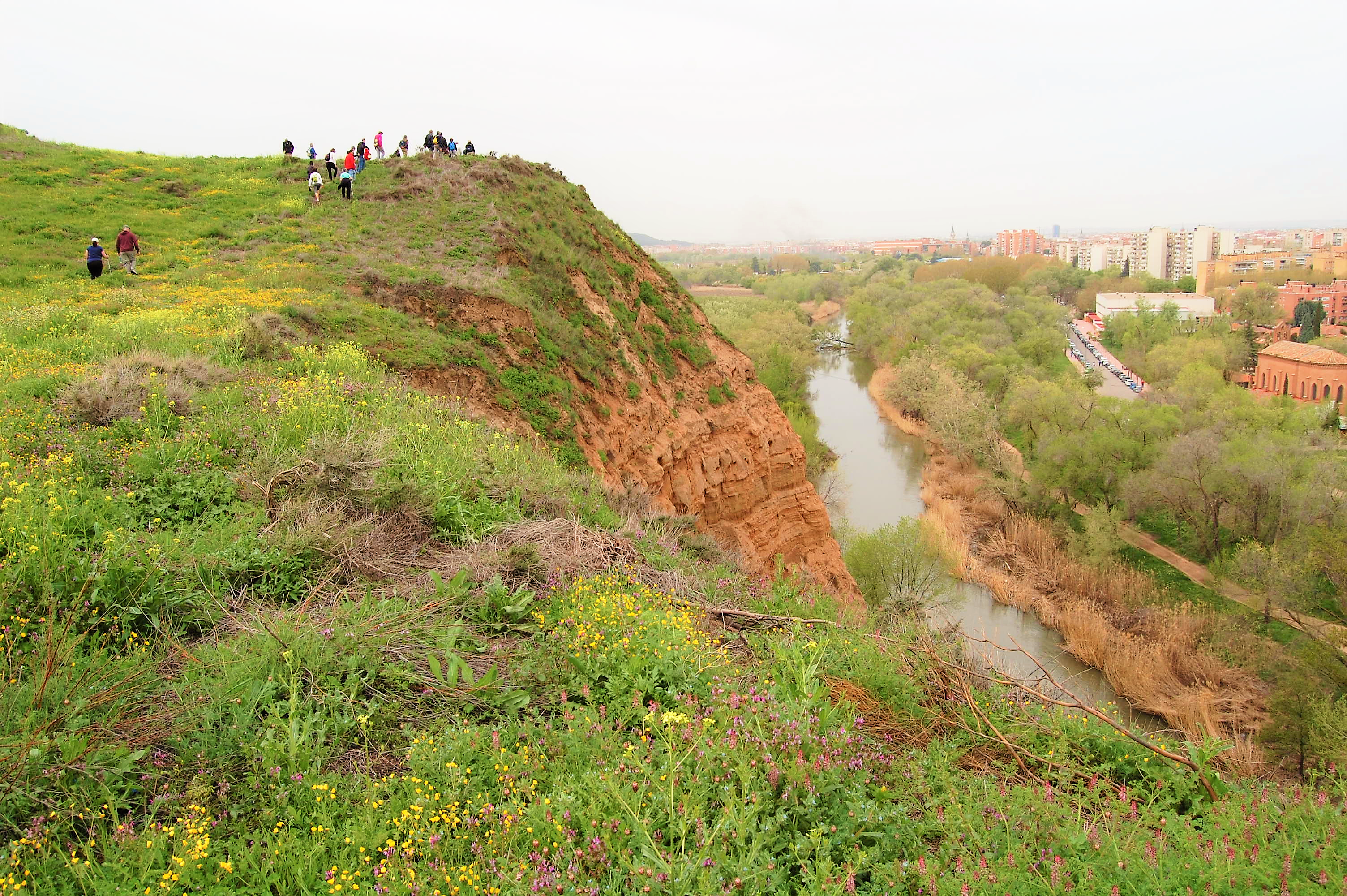 Cuenca del río Henares a la altura de la ermita del la Virgen del Val en Alcalá de Henares (Comunidad de Madrid - España). Fotografía tomada desde Alcalá la Vieja en el Parque de los Cerros. This is a photography of a Special Area of Conservation in Spain with the ID: ES3110001. Natura2000 entry, EEA entry